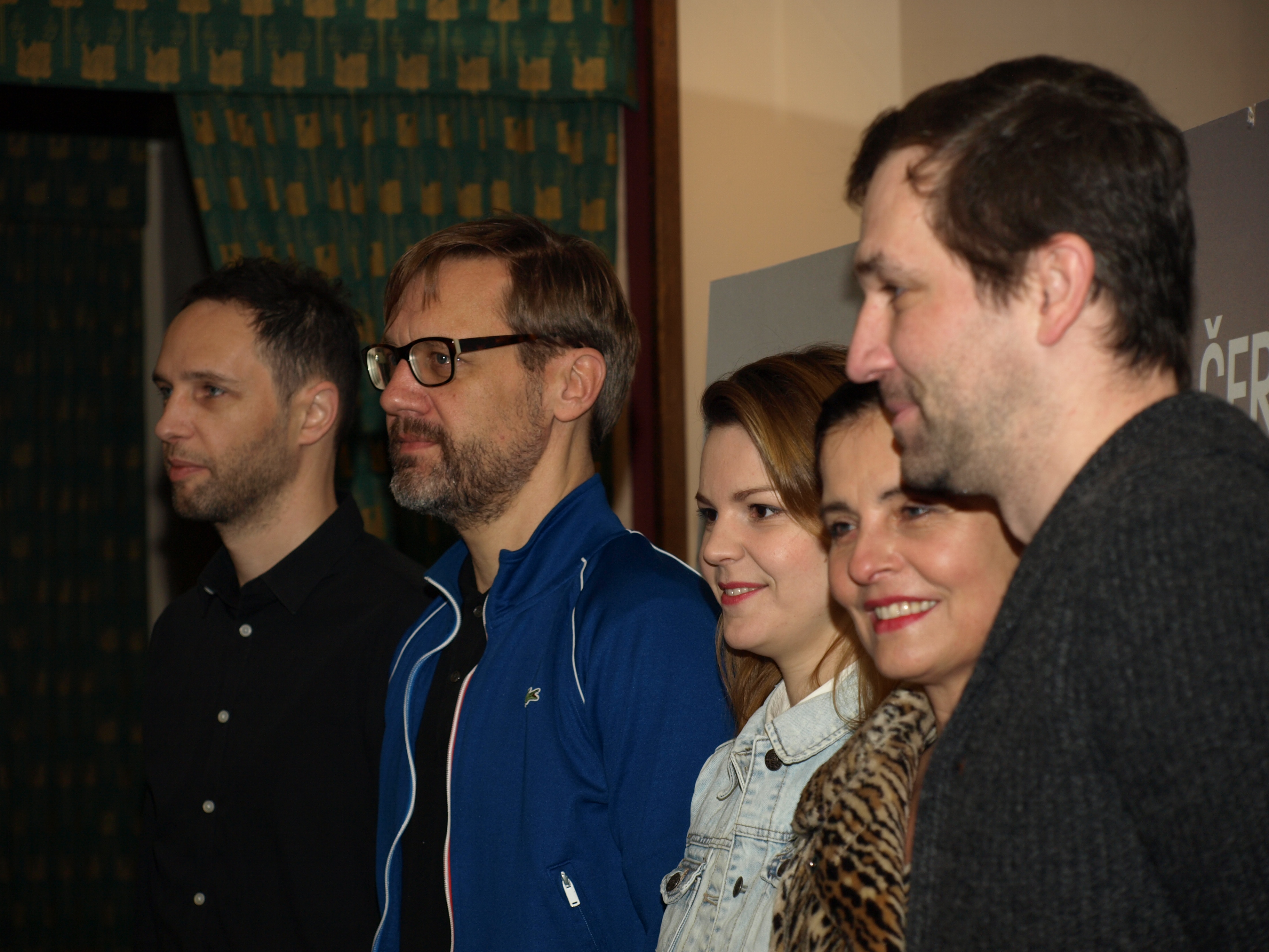 Novinářská konference filmu Krásno - Autor: Blanka Borová pro & 10Mpix.cz